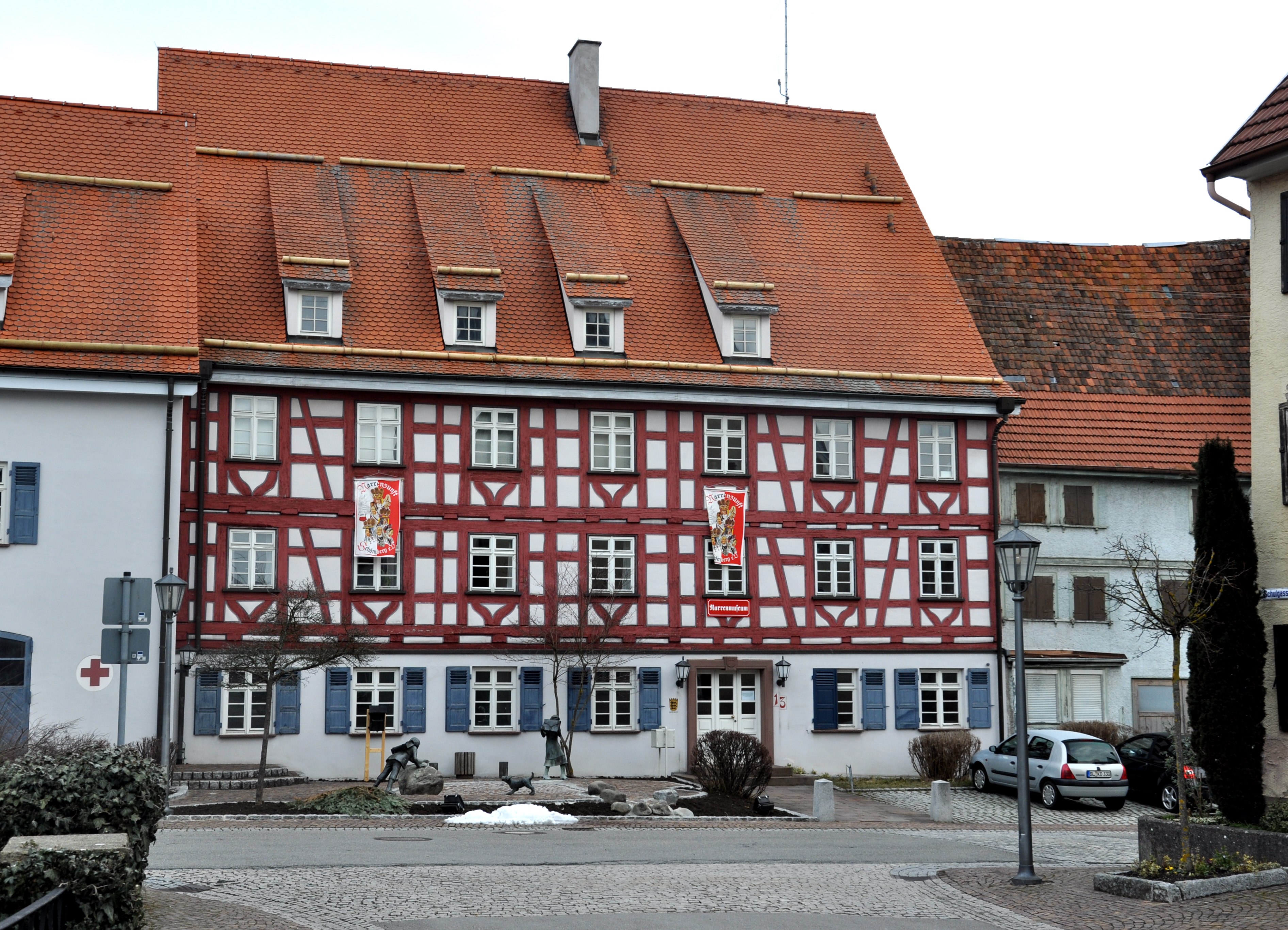 Schömberg (Zollernalbkreis), Alte Schule, jetzt Narrenmusuem und Notariat